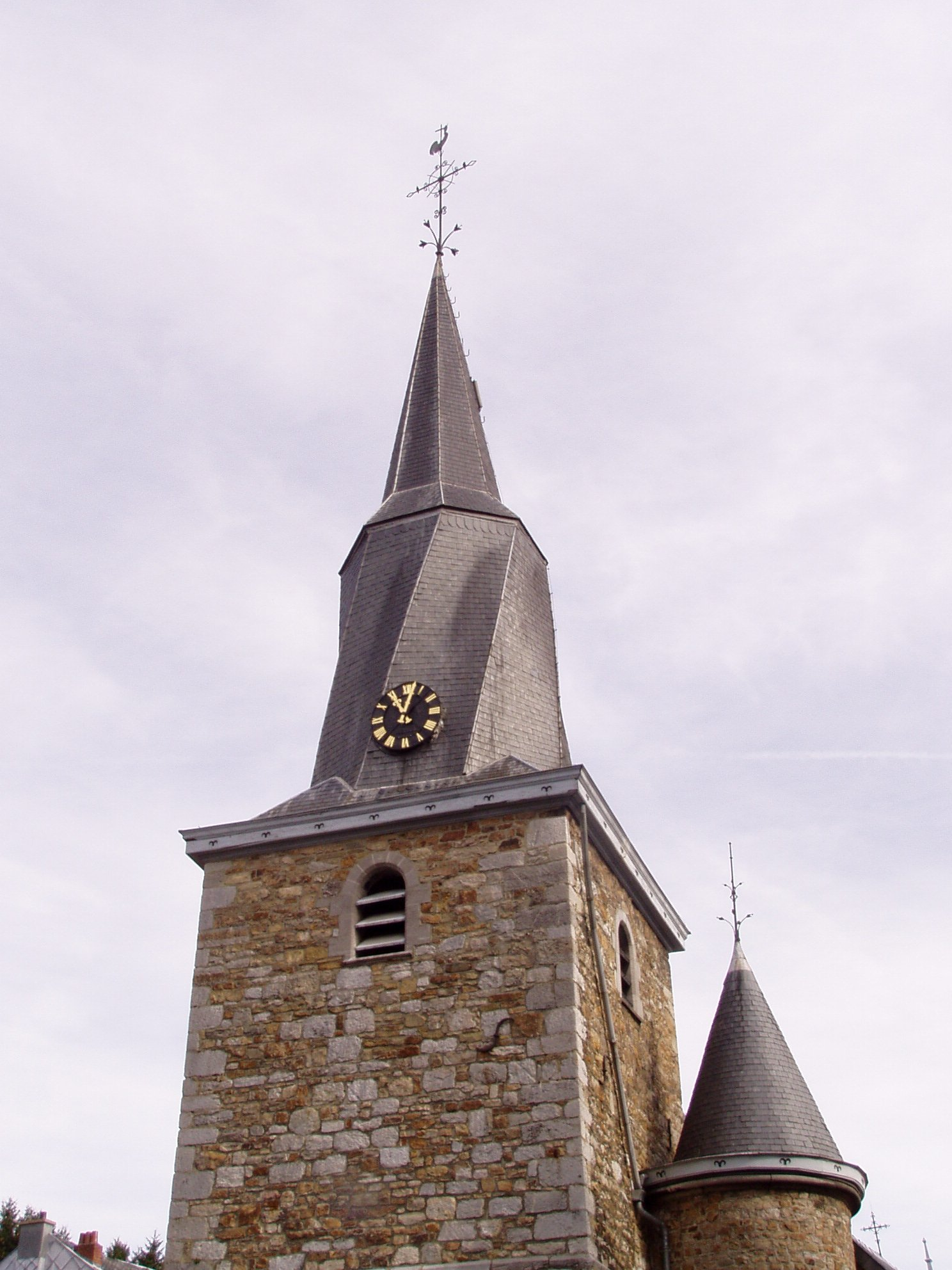 photographie du clocher tors de l'église de Polleur (Belgique) prise par Accrochoc le 1er octobre 2006